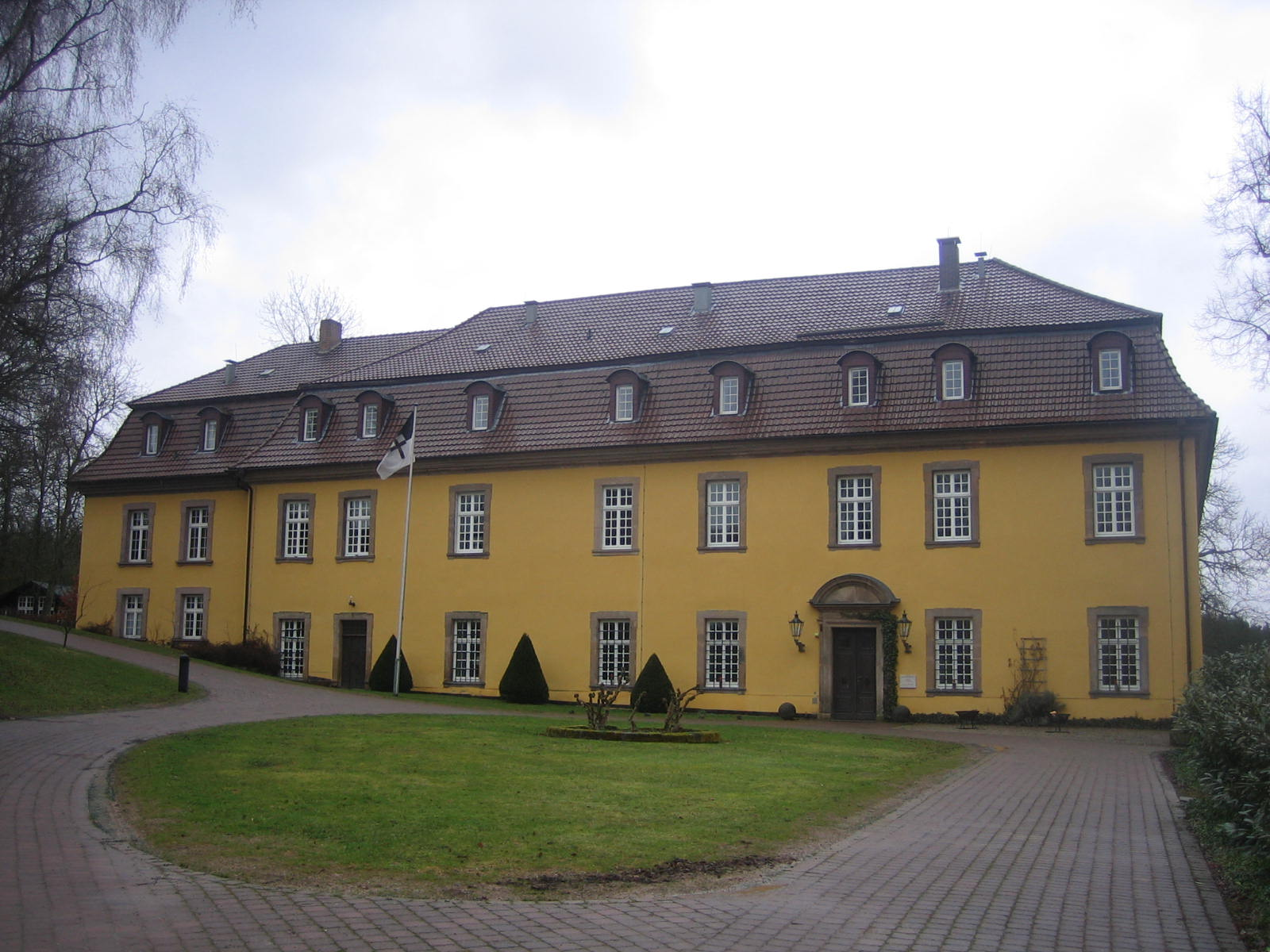 Schloss Hönscheid in Hessen